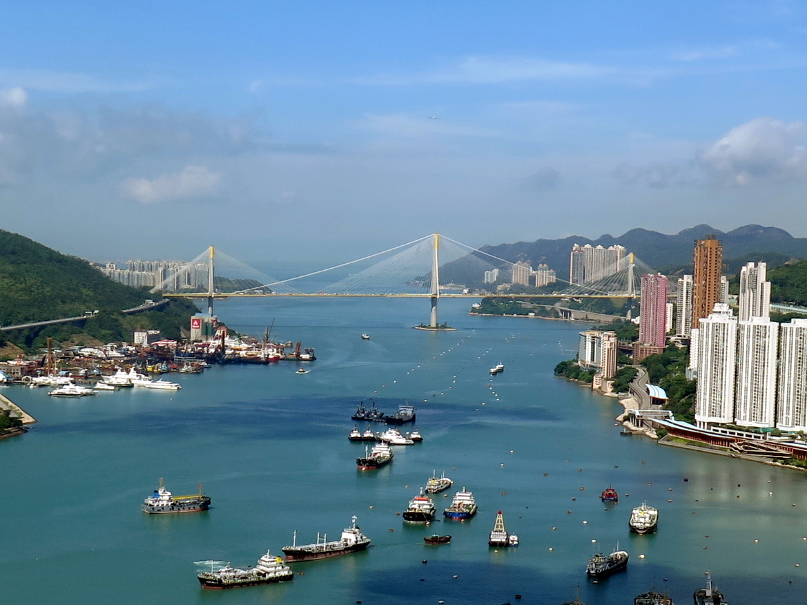 Ting Kau Bridge